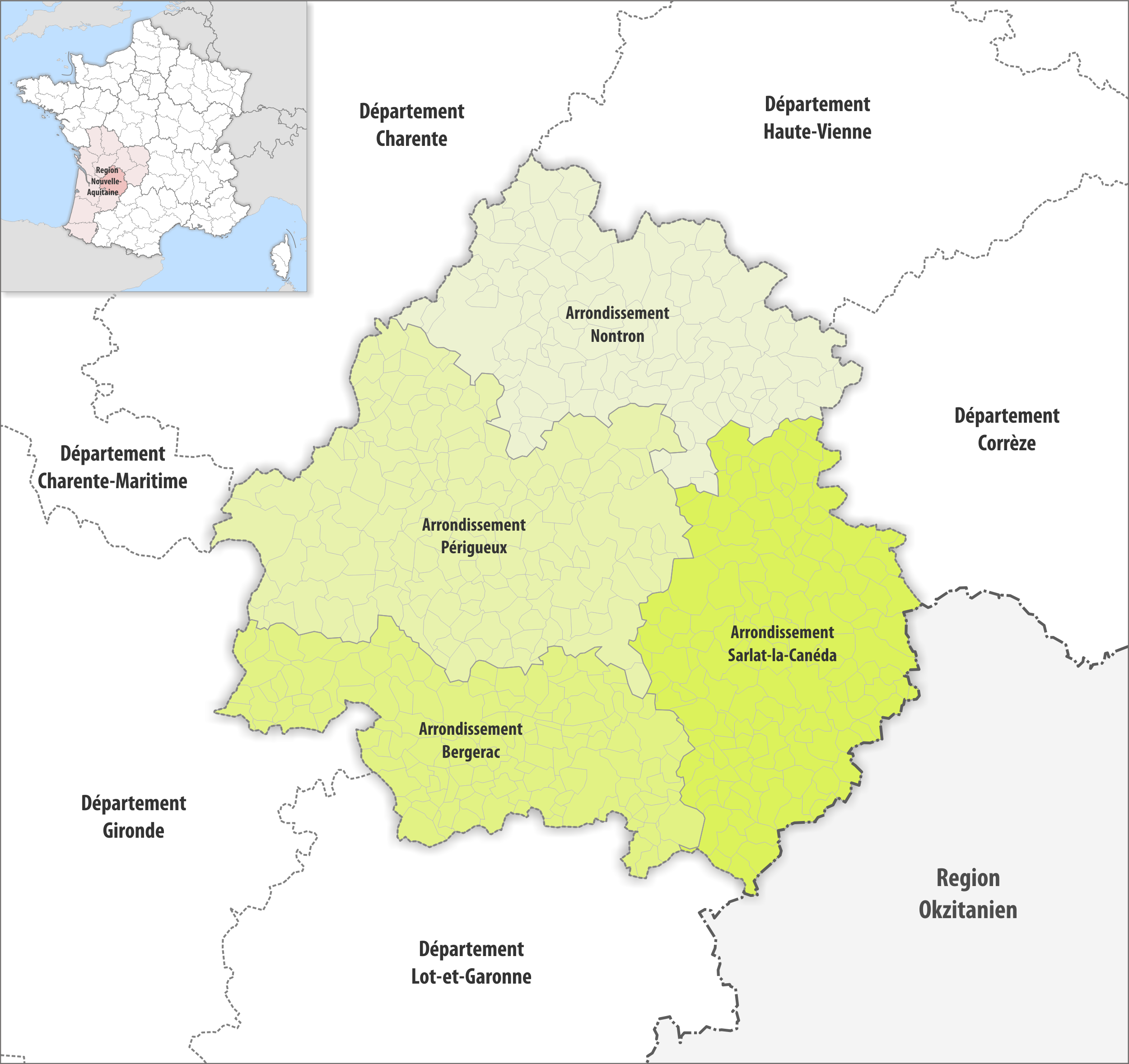 Gemeinden und Arrondissemente im Departement Dordogne